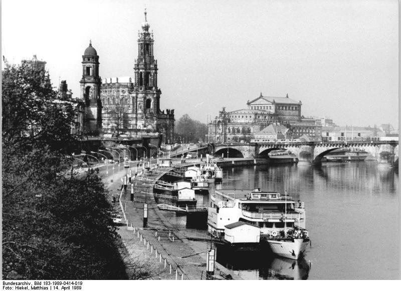 Dresden, "Weiße Flotte", Ausflugsschiffe, Hofkirche ADN-ZB Hiekel 14.4.1989 Dresden: Zur Fahrt in den Frühling liegen an der Anlegestelle im Zentrum der Stadt wieder Schiffe der "Weißen Flotte" bereit. Während die kleinen Motorschiffe bereits seit dem 1. April in Richtung Sächsische Schweiz verkehren, werden die größeren nach und nach bis zum 13. Mai eingesetzt. Insgesamt fahren in dieser Saison auf dem rund 100 km langen Abschnitt der Oberelbe zwischen Schmilka und Riesa 13 Motor- und Dampfschiffe des VEB Fahrgastschiffahrt Dresden. Im vergangenen Jahr nutzten rund 1,3 Millionen Fahrgäste dieses Angebot.